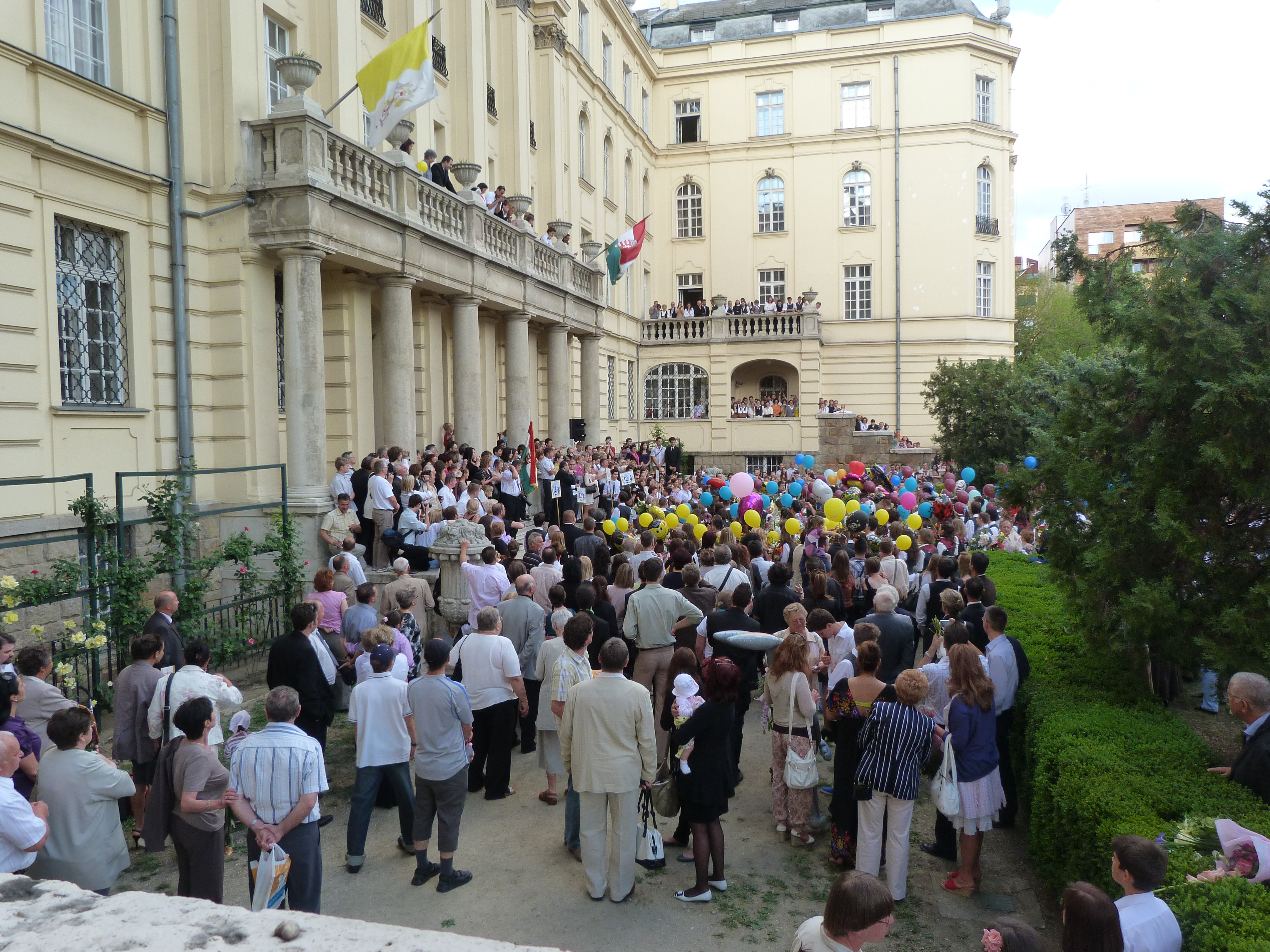 A felvétel 2012. május 4 -én pénteken készült Budapesten, a Szent Margit Gimnázium udvarán. A Ballagás után Görbe László igazgató búcsúzott a Gimnázium végzős, 12 .-es diákjaitól. Legyetek igényesek, keressétek a szebbet, a jobbat és az igazabbat - mondta. (1.14). A beszéd megjelent hasonló cím alatt a -on illetve a Metapolisz DVD sorozatban.